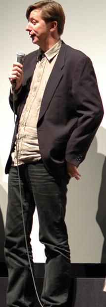 Hal Hartley